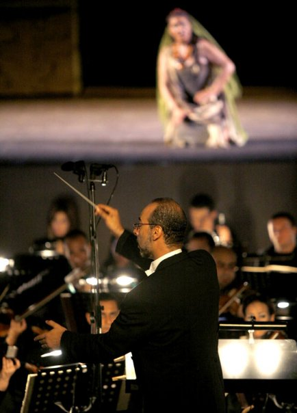 صورة للمايسترو نادر عبـاسى